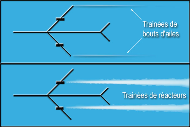 Deux types de formation des traînées de condensation peuvent se former derrière un avion à réaction. 1) En haut, la condensation due à la variation de pression au bout des ailes qui refroidit l'air suffisamment pour qu'il sature. Dans un air dépourvu de nuage, mais avec une humidité relative proche de 100%), les changements de pression généré par le vortex formé à l'extrémité de l'aile peut provoquer une trainée de vapeur condensée. Elle est due à une chute de température qui induit une saturation complète de l'air qui induit la nucléation de l'eau vapeur en microgouttelettes C'est un phénomène aérodynamique rare (plutôt en zone tropicale et au dessus de la mer dans un air très humide) et qui produit des traînées beaucoup moins prononcées que celles formées par d'échappement de réacteurs. 2) En bas, la condensation des gaz d'échappement humide des réacteurs dans l'air ambiant d'altitude très froid.